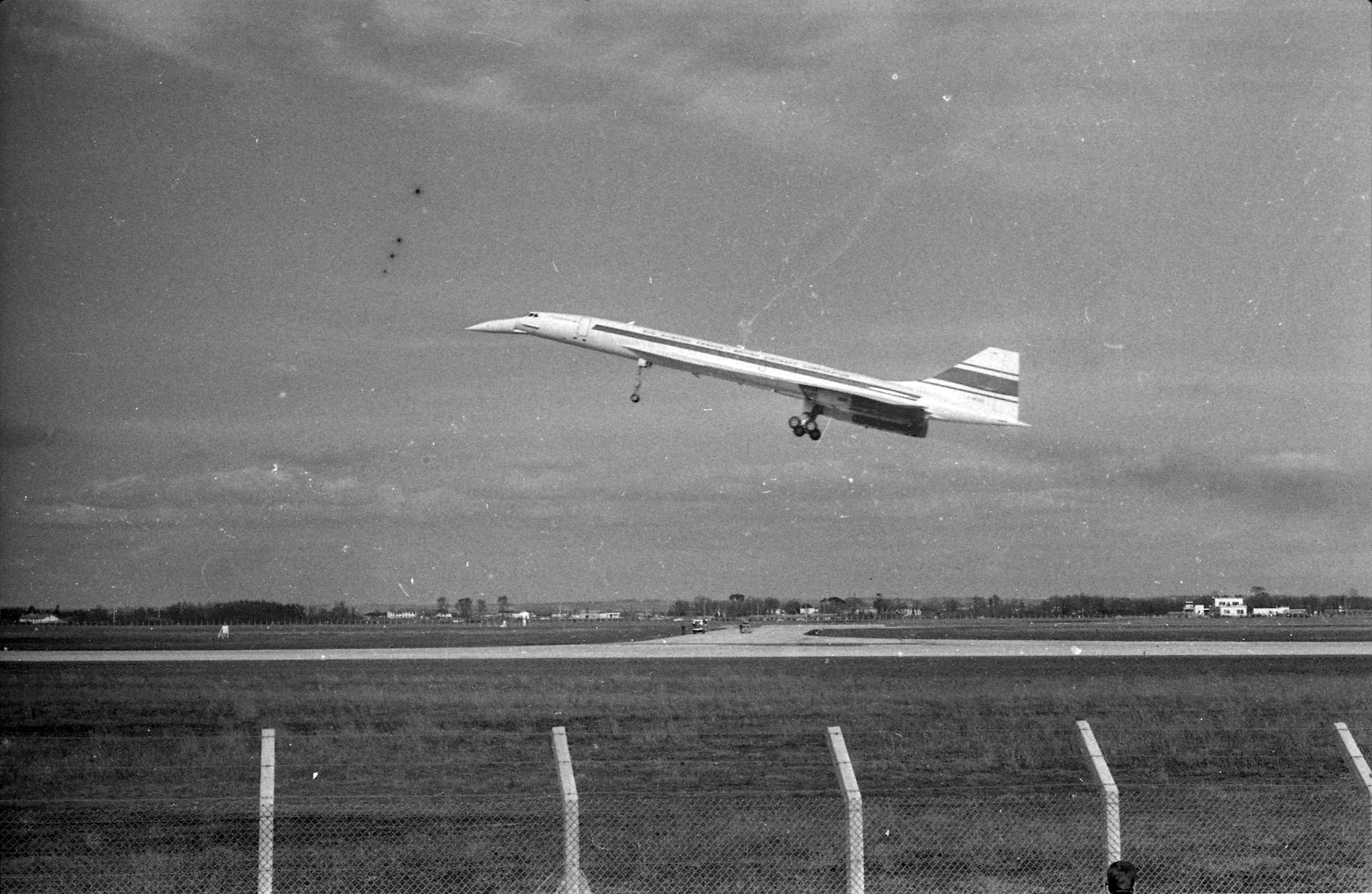 Pistes de Blagnac (piste Concorde). 2 mars 1969. Vue d'ensemble de côté Concorde au décollage. Cliché pris lors du 1er vol d'essai du Concorde.